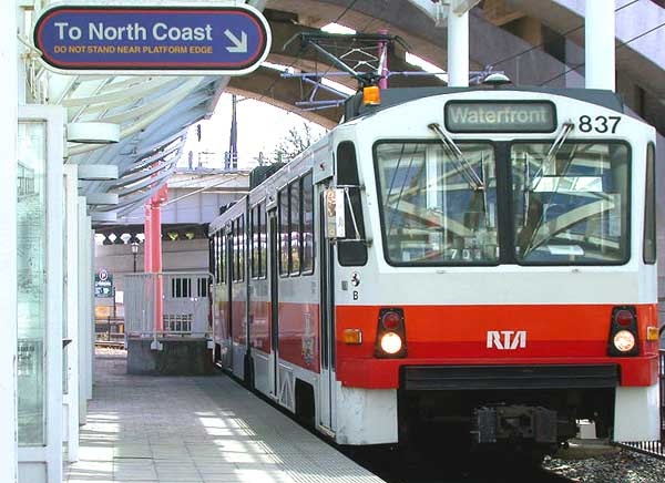 Súprava metra v Clevelande.